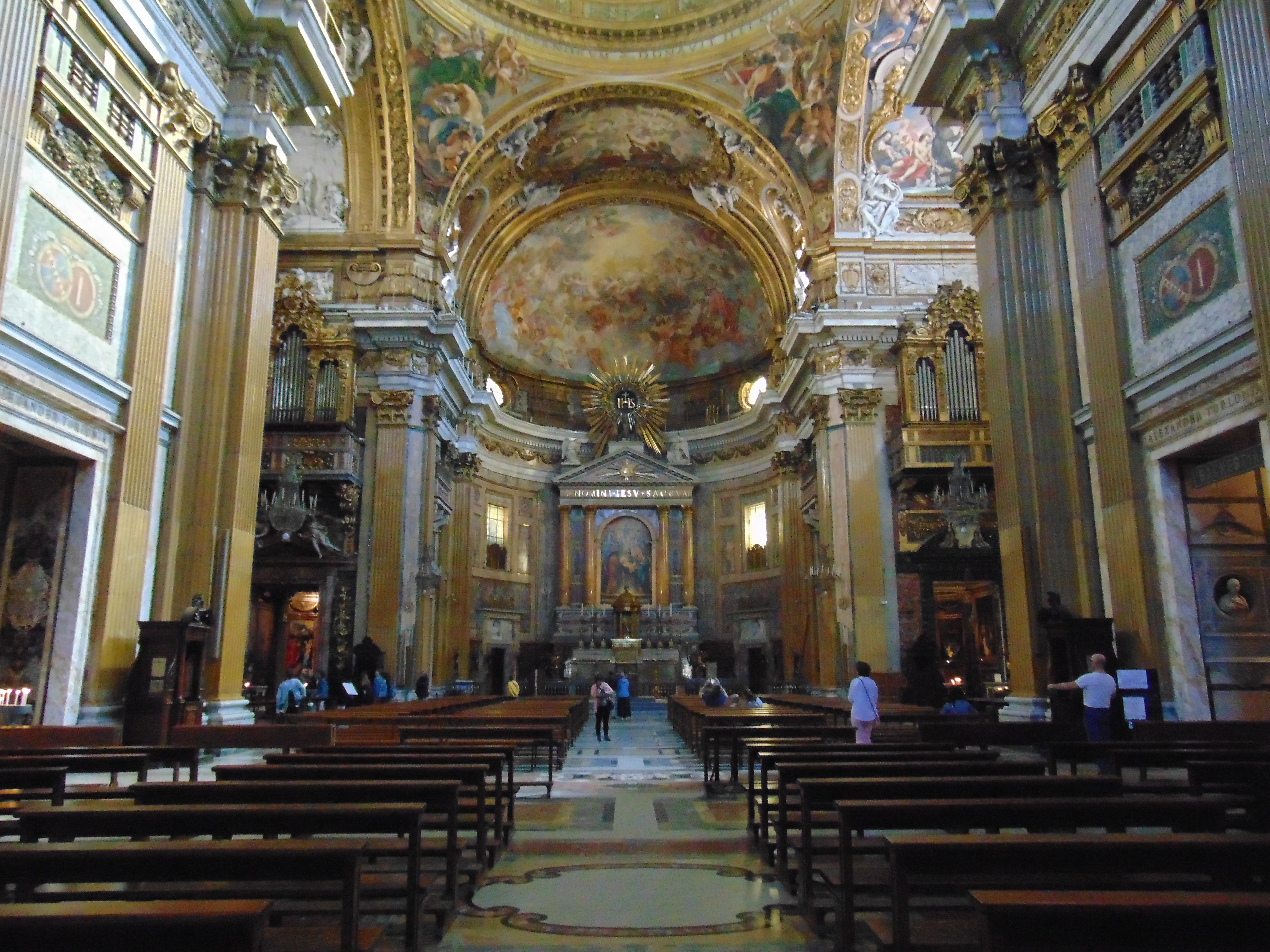 Chiesa del Gesù